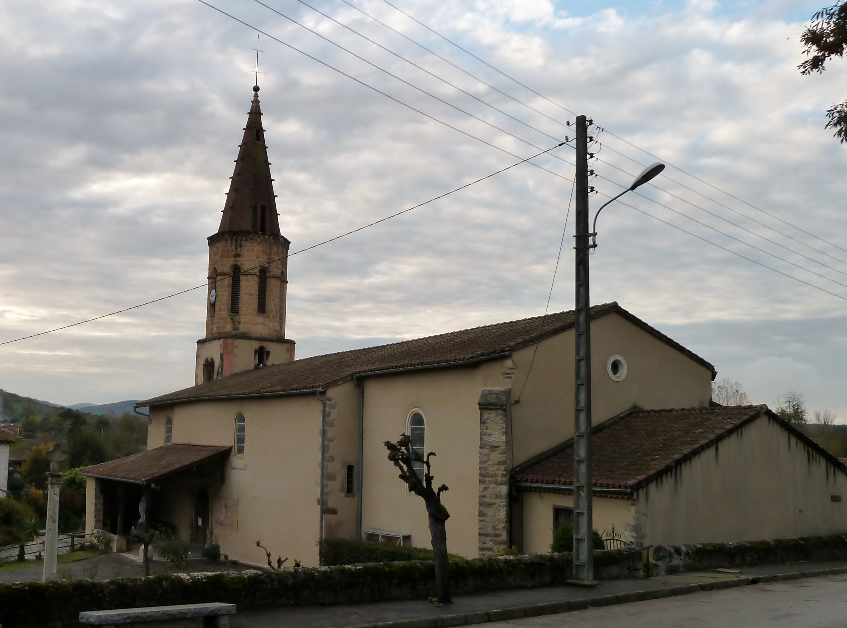 Eglise de Soueich